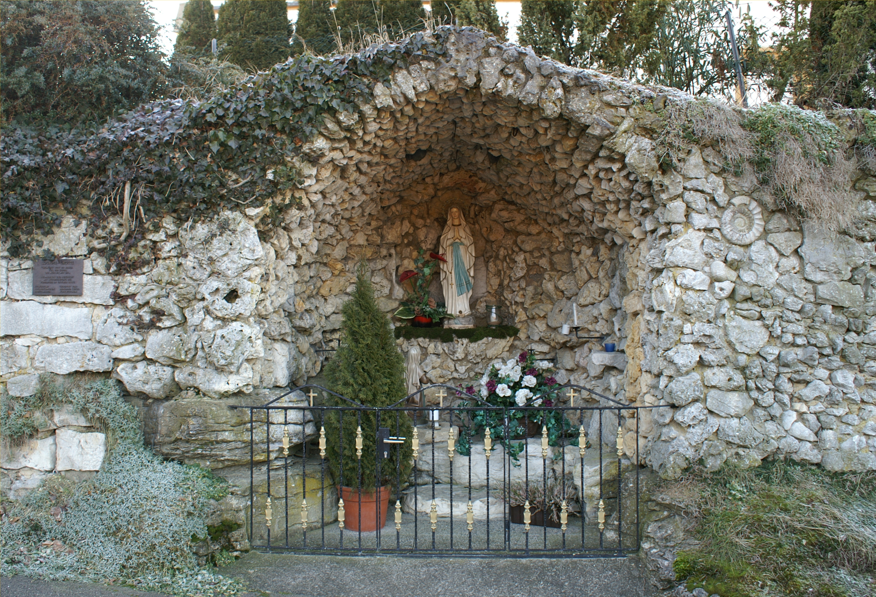 Die Lourdes-Grotte in Treffelhausen befindet sich unterhalb der St. Vituskirche